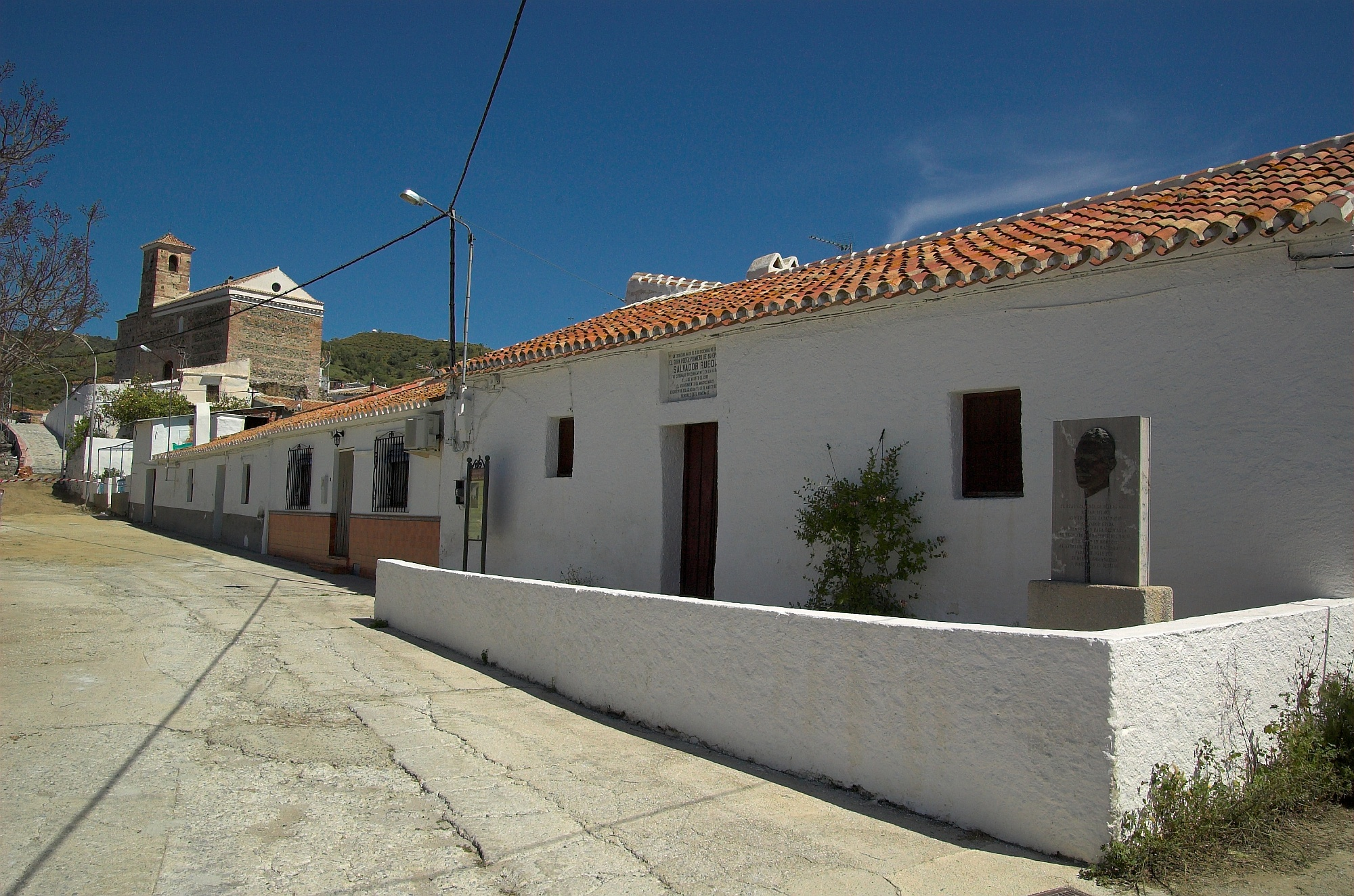 Casa natal de Salvador Rueda en Benaque, al fondo, la iglesia.